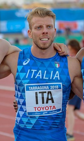 Davide Manenti en los relevos 4x100 en los Juegos del Mediterráneo 2018